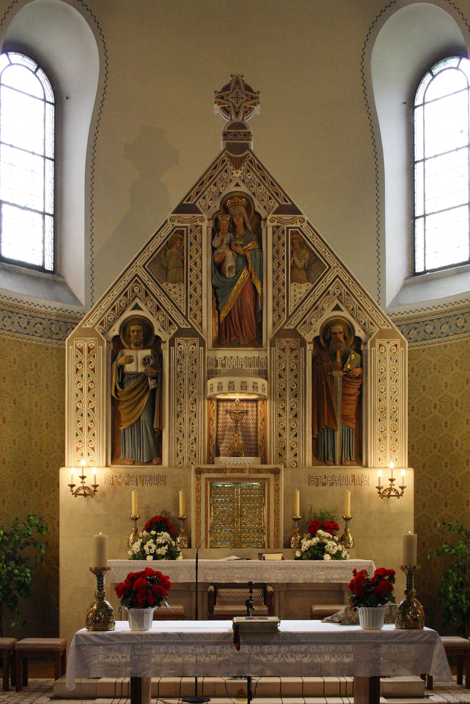 Der Jugendstilaltar der Kierlinger Pfarrkirche.